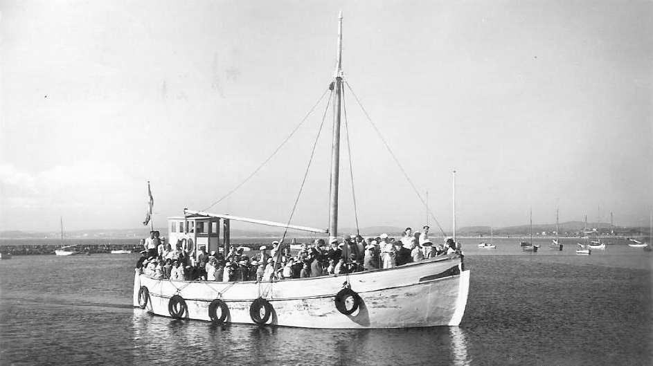 Getteröbåt, 1940-talet